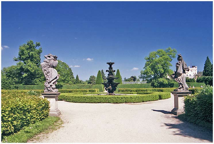 Zámecký park Lednice